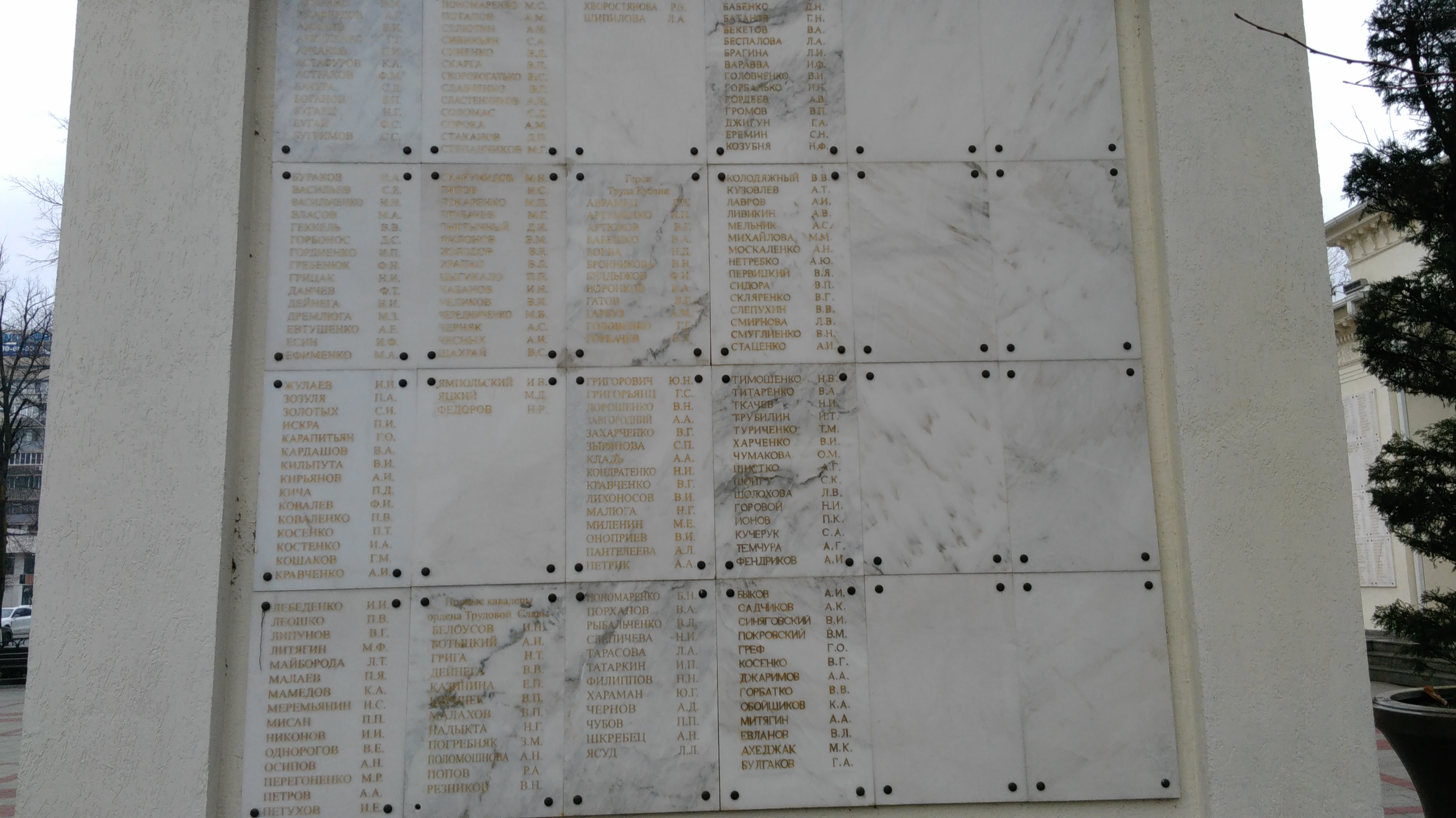 Мемориальная Доска Краснодар Ролнвы кавалеры ордена Славы